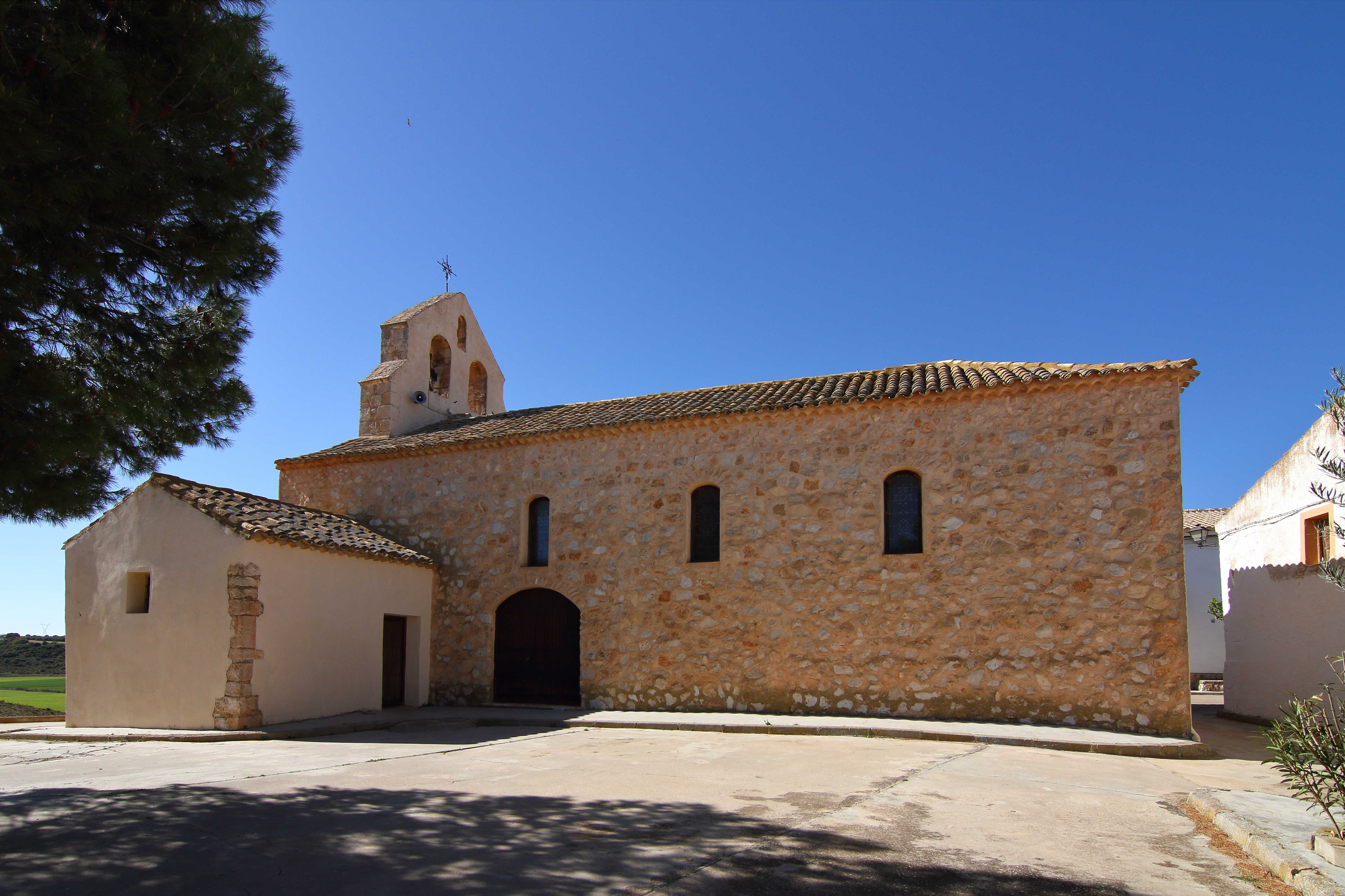 Valhermoso de la Fuente, Iglesia de San Blas, fachada principal